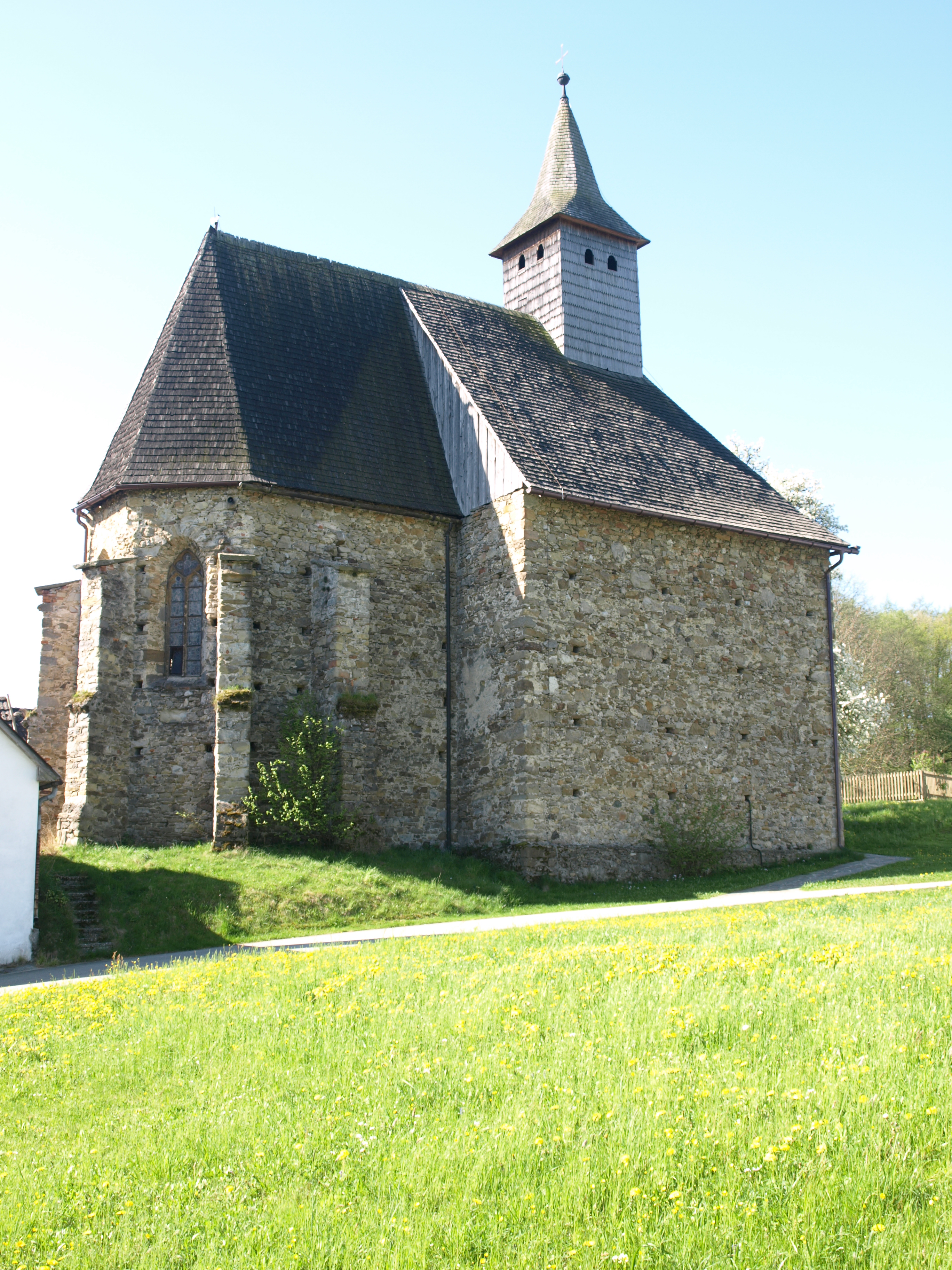 Kath. Filialkirche hl. Martin